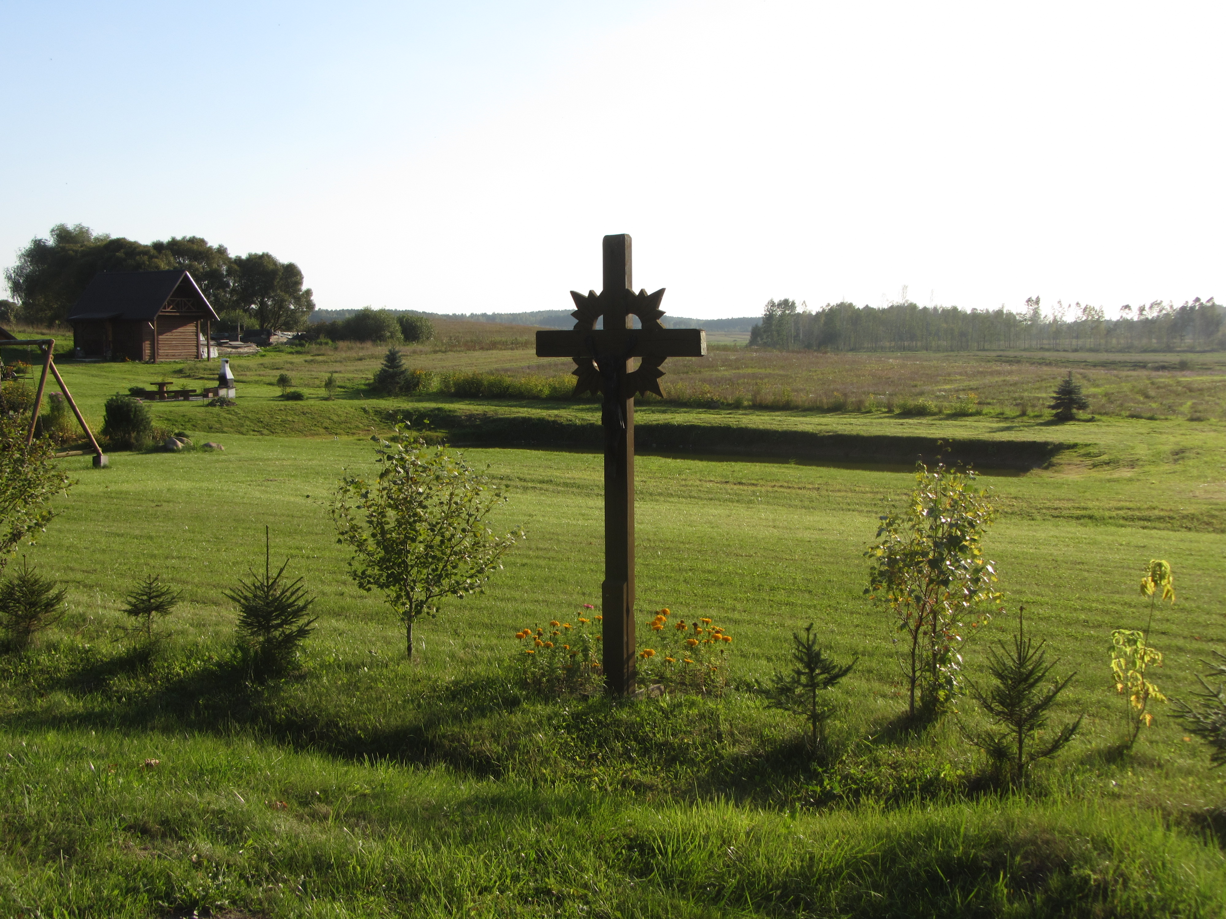 Pilvingiai, Lithuania